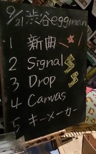 amiinaセトリボード(20150921(1))